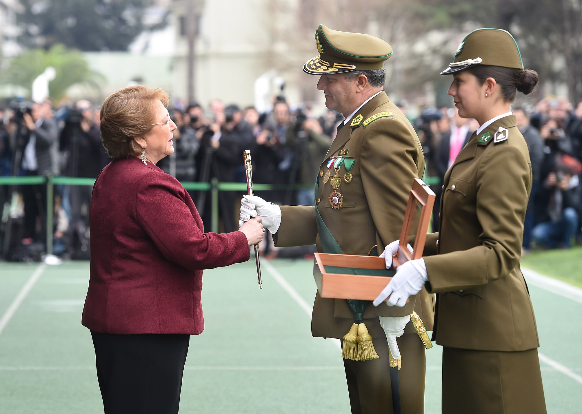 Gobierno de Chile